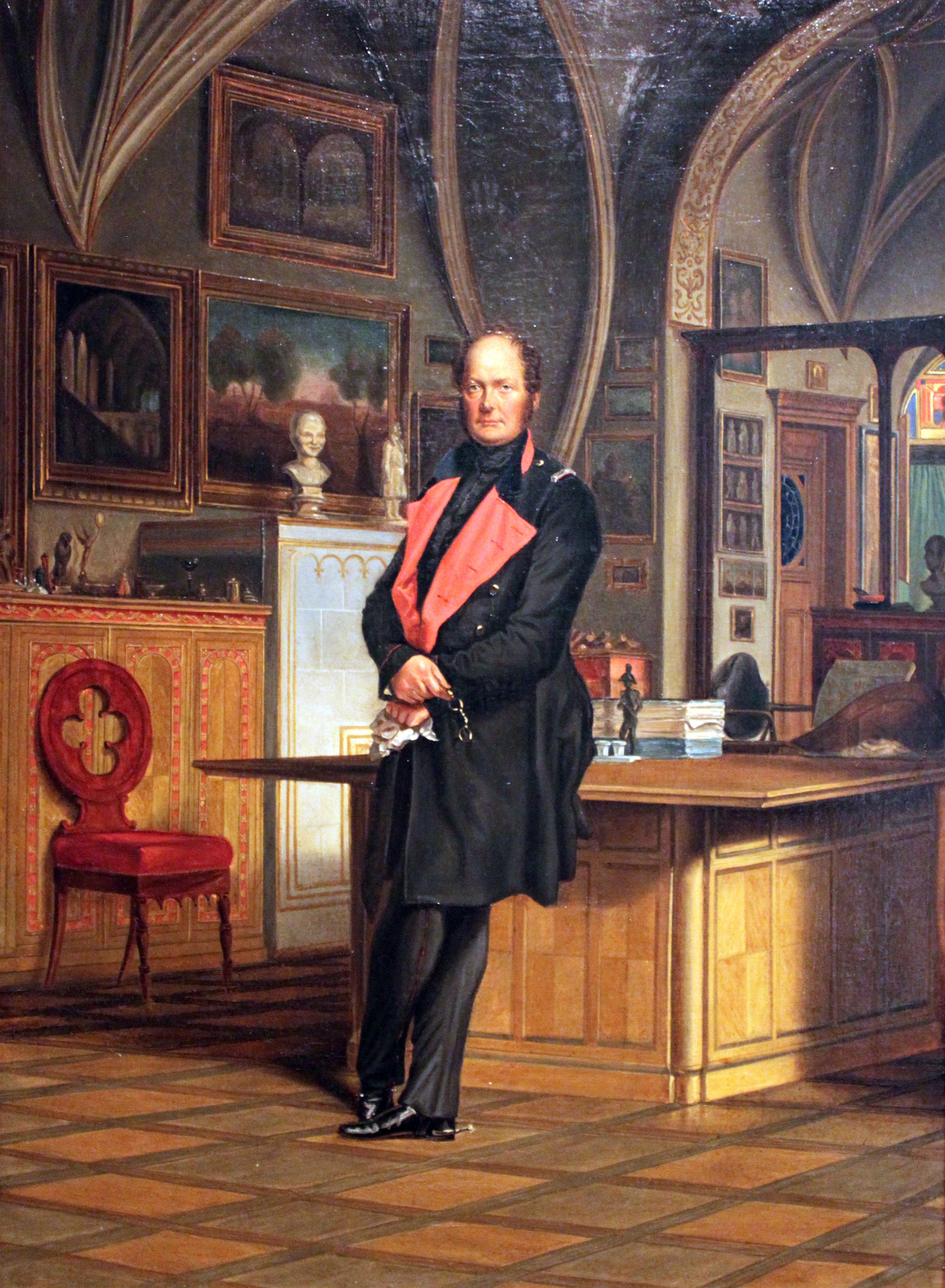 Friedrich Wilhelm IVlabel QS:Lde,"Friedrich Wilhelm IV., König von Preußen, in seinem Arbeitszimmer im Berliner Schloss"label QS:Len,"Friedrich Wilhelm IV"